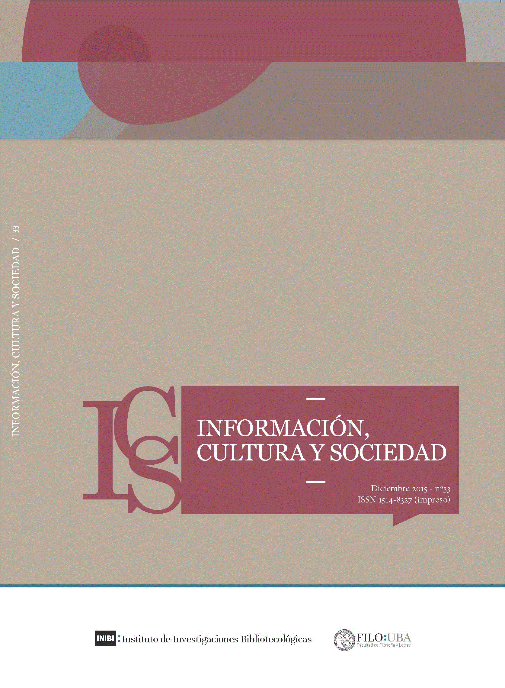 Imagen de la revista Información, Cultura y Sociedad del INIBI